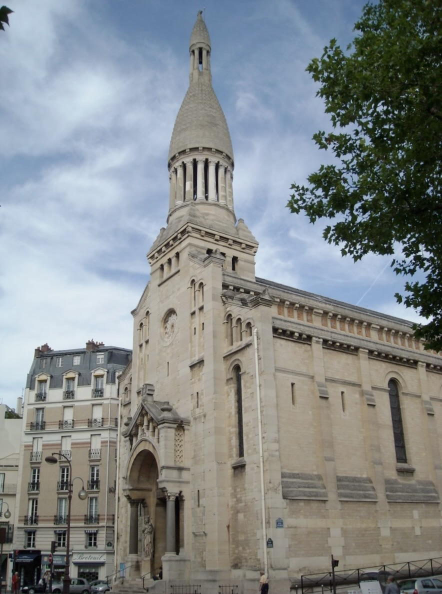 L'église depuis la sortie du métro